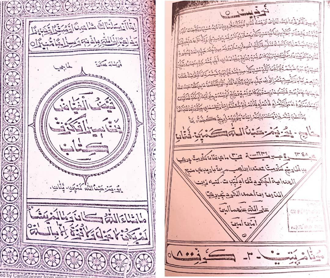 ശുജാഈ മൊയ്തു മുസ്ലാരുടെ ഫൈളുൽ ഫയ്യാള് എന്ന അറബി മലയാള കൃതി